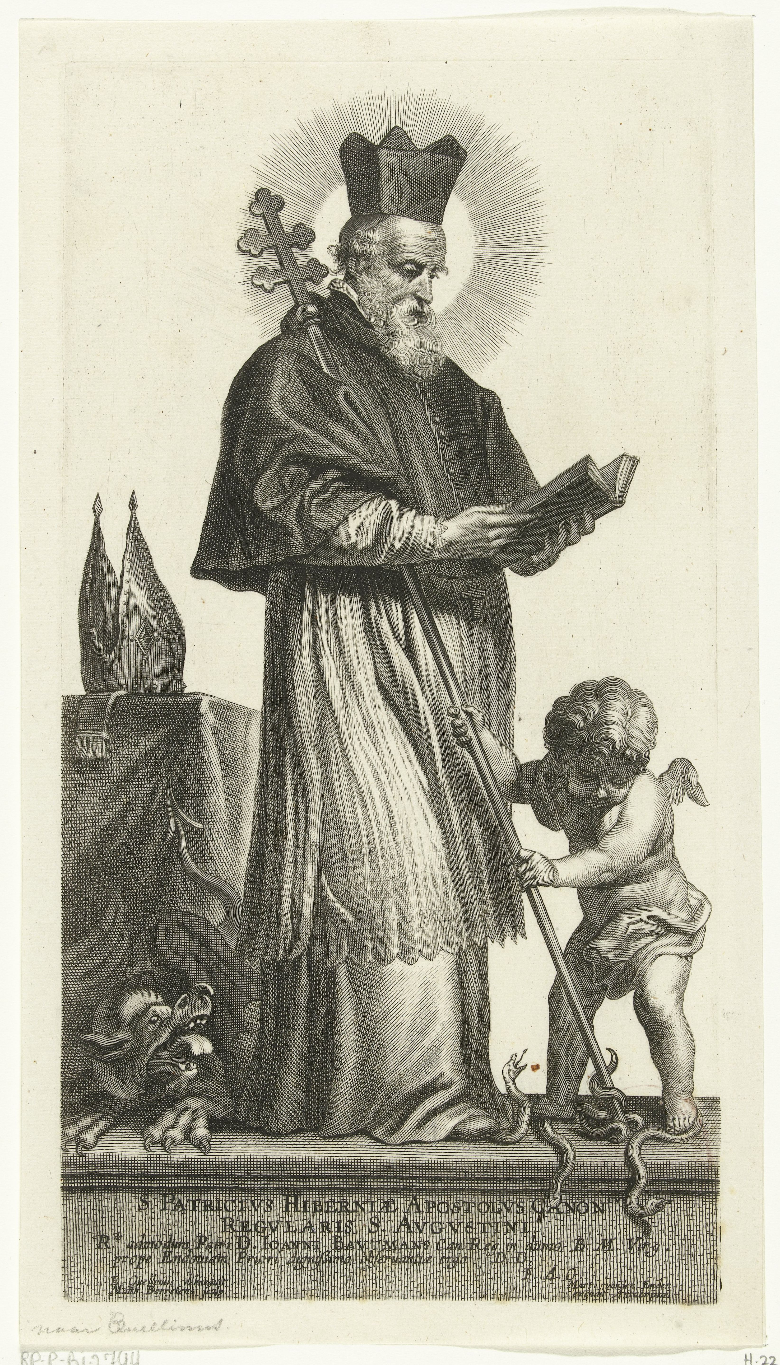 Mattheus Borrekens, « Saint Patrice », 1625-1670, estampe, Rijksmuseum, Amsterdam, inv. RP-P-BI-2744